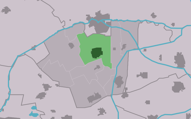 Kaartsje fan himrik fan Damwâld